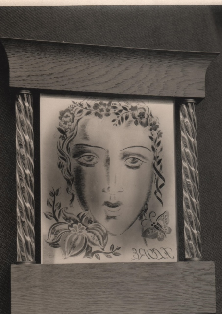 Petite glace gravée (thème Flore), visage de femme avec guirlande de fleurs dans les cheveux, papillon, grosse fleur et flore écrit, présentée dans un cadre décoratif, oeuvre de Pierre Lardin.